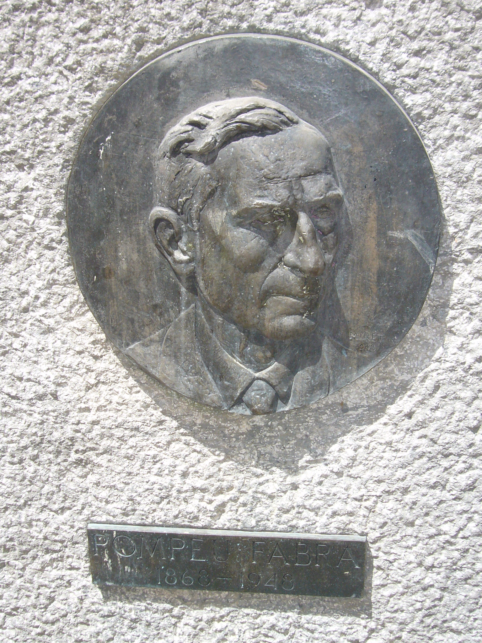 Medalló de Pompeu Fabra, als voltants del carrer Sant Just, Vic